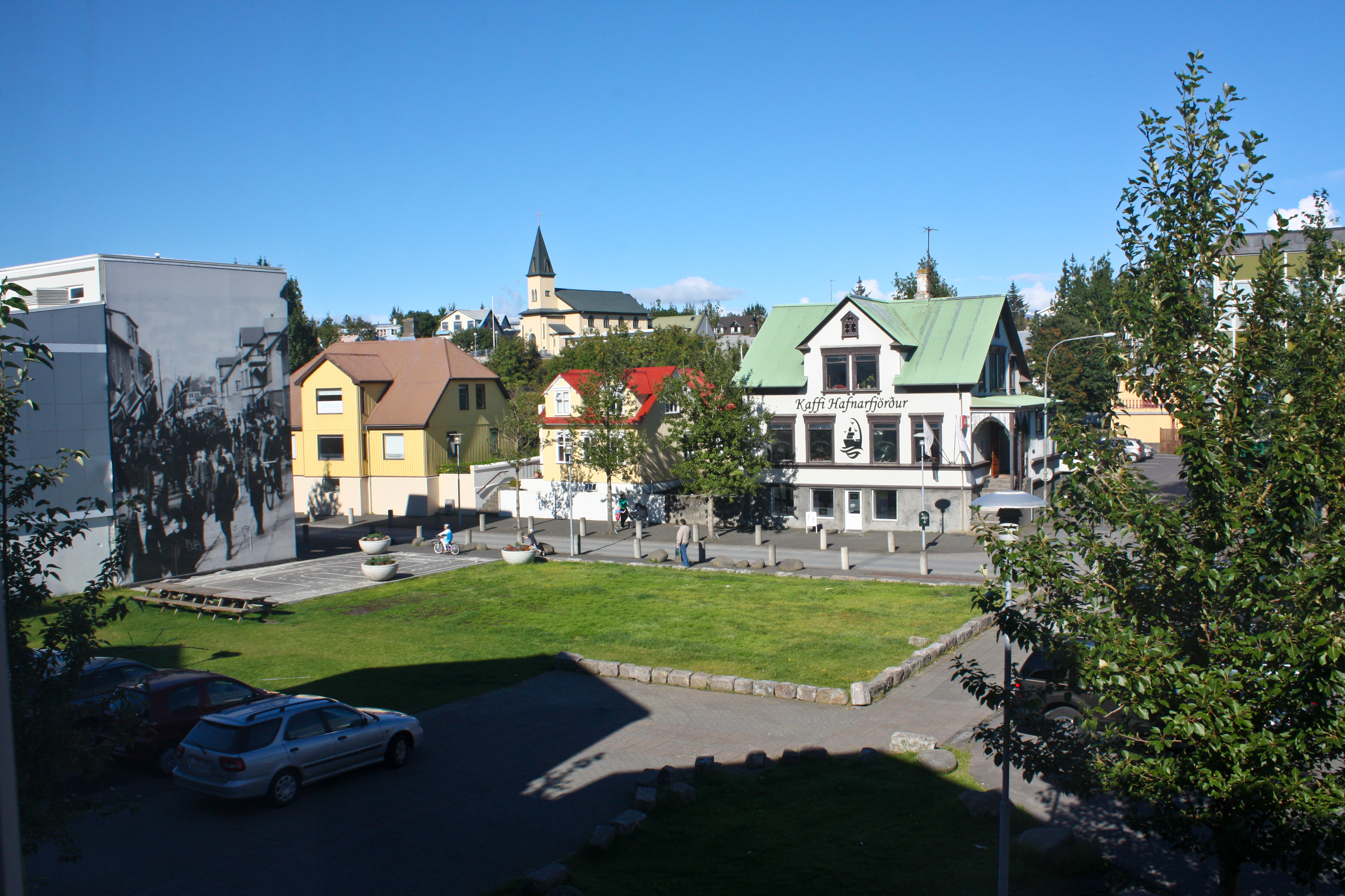 Hafnarfjordur